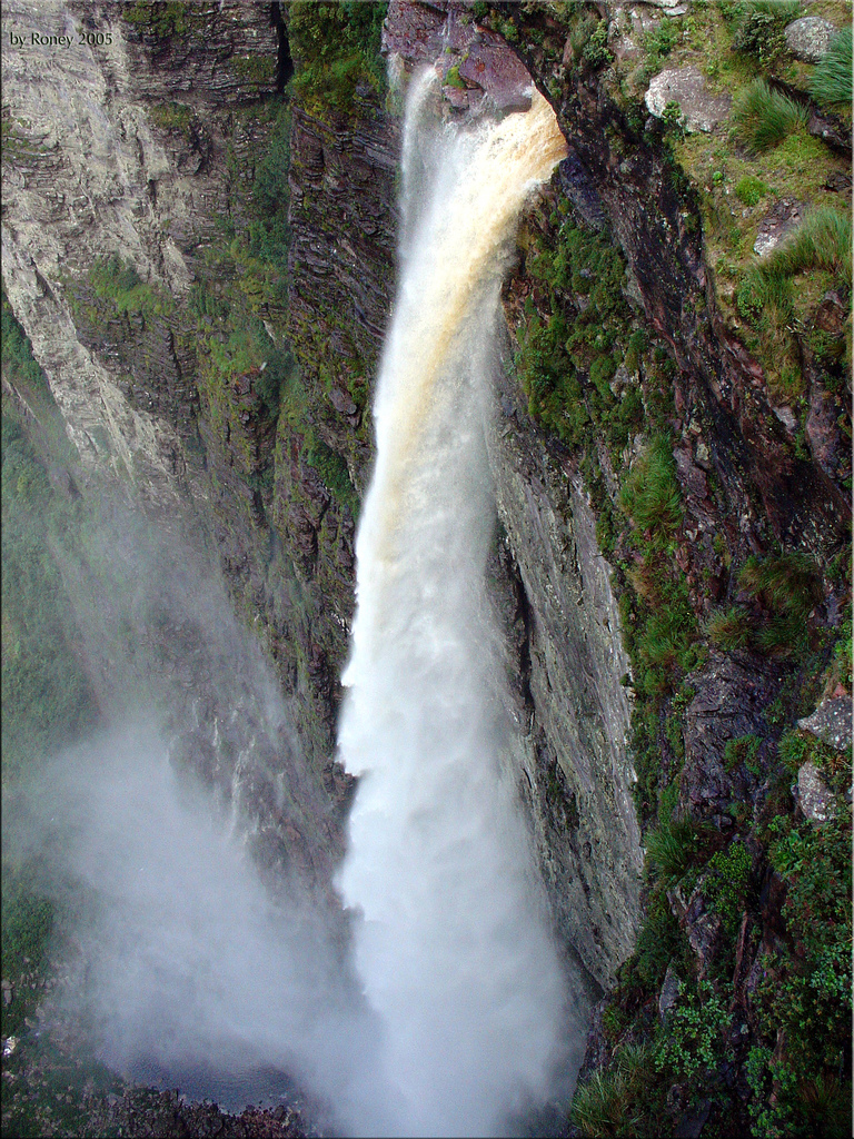 o olho da cachoeira da fumaca vista por cima... um dia excepcional com muita agua